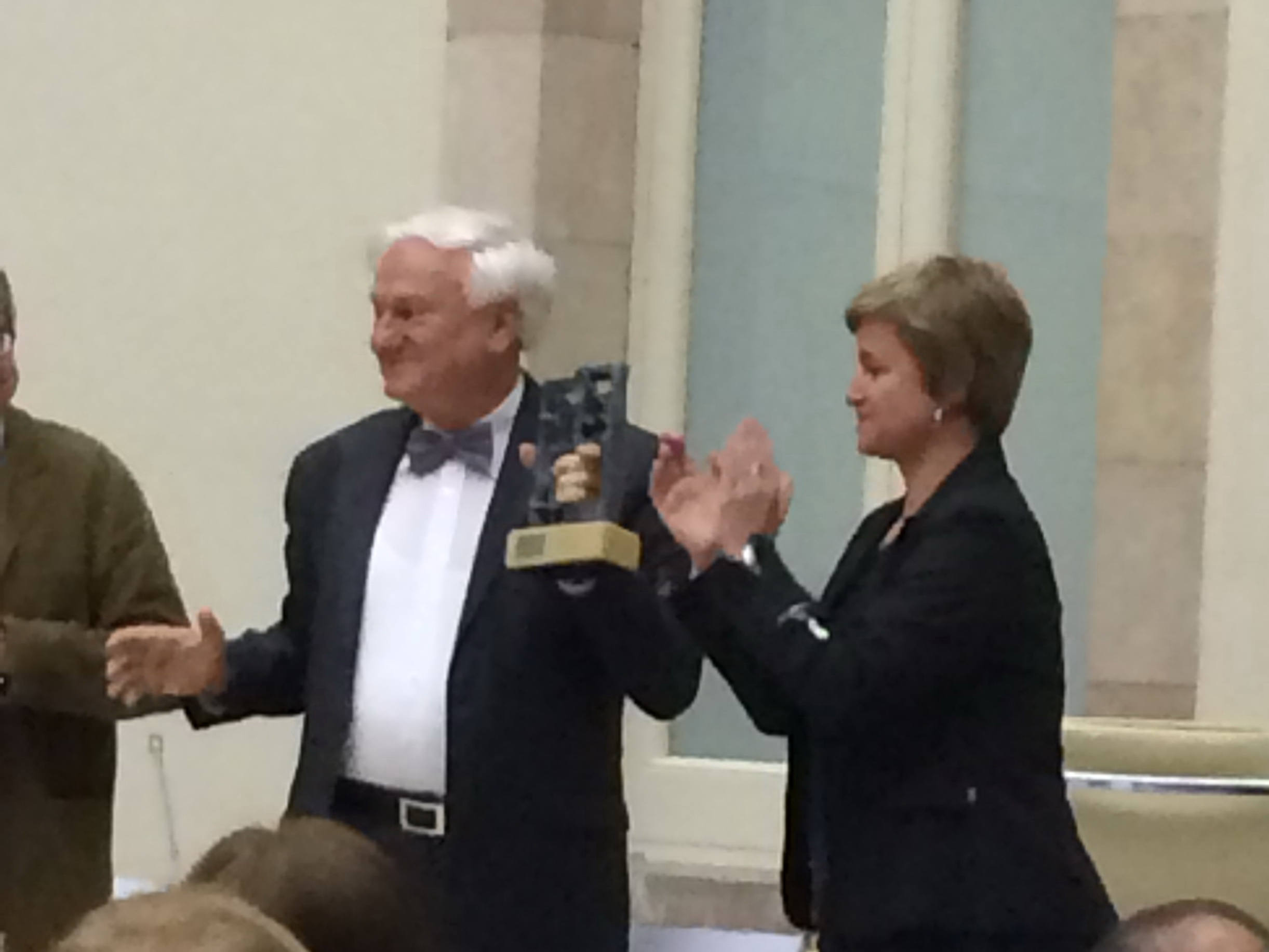 Jovan Divjak recollint el premi "Constructors de la Pau" atorgat pel ICIP (Institut Català Internacional per la Pau) en l'edició de 2013, al Parlament de Catalunya, lliurat per la seva vice-presidenta, Anna Simó. Barcelona 18 març de 2014